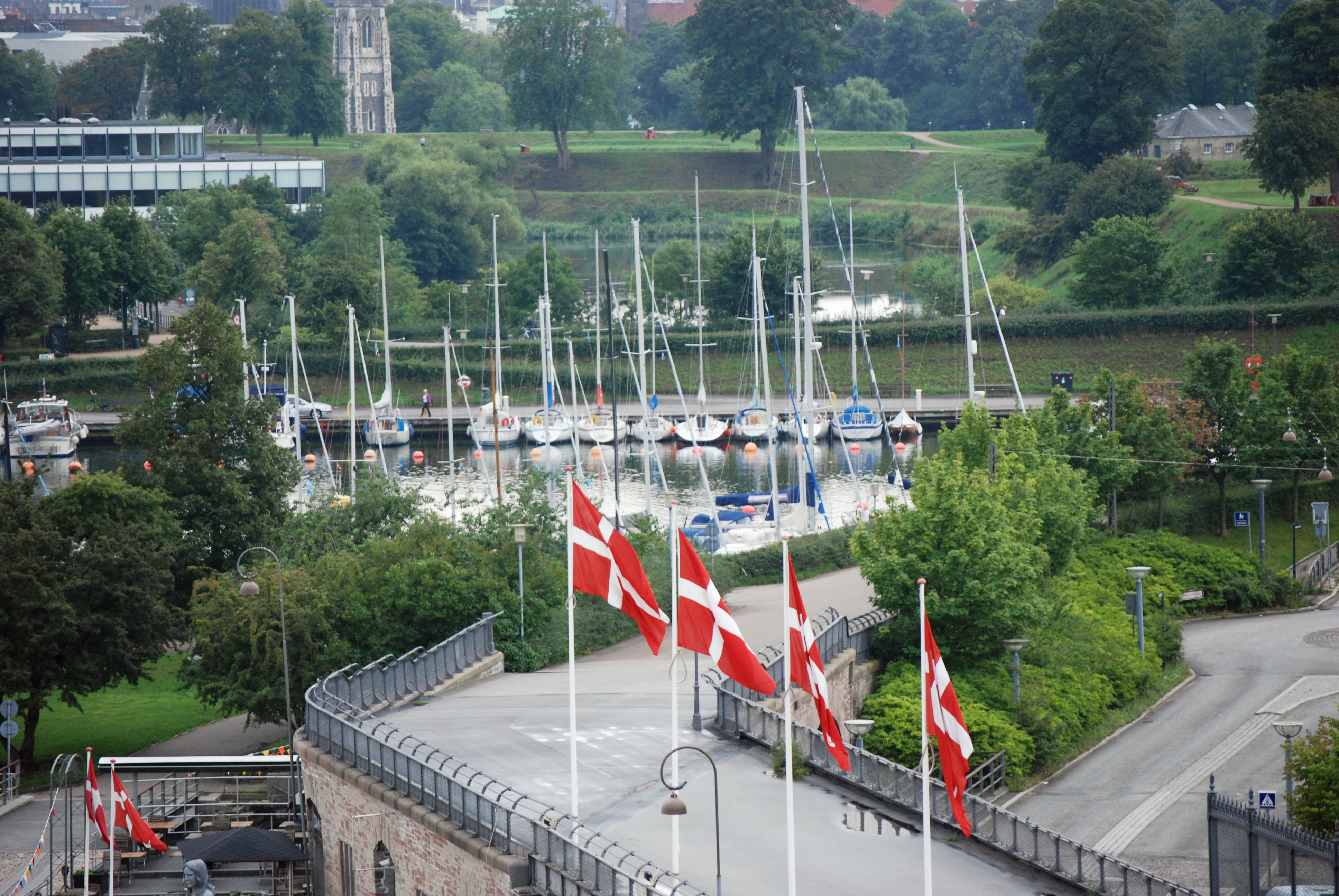 Langelinie Marine in Copenhagen, Denmark ]